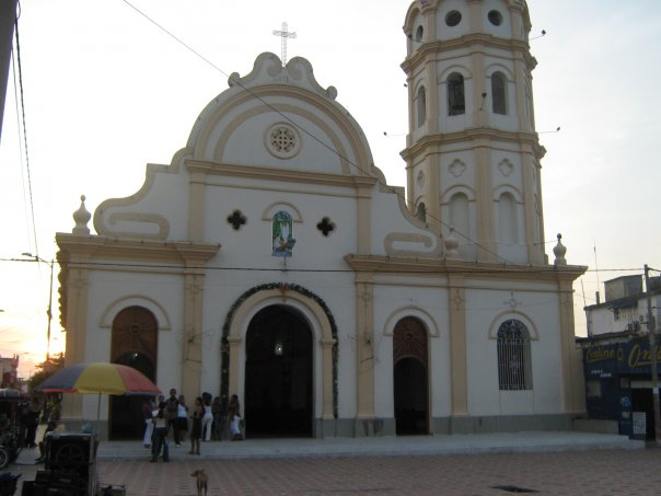 Templo Parroquia San Rafael de Fundación